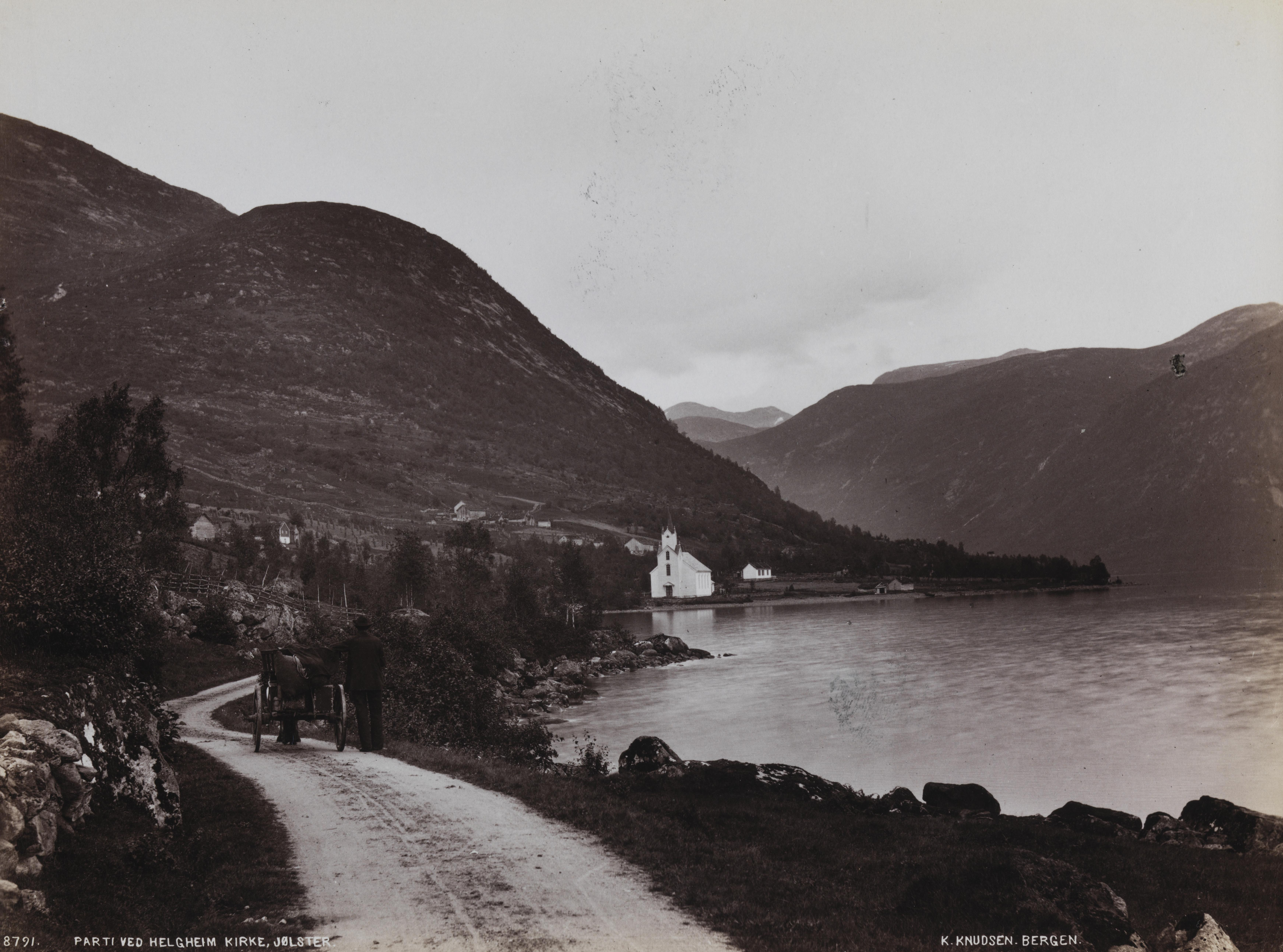 Bildet er hentet fra Nasjonalbibliotekets bildesamling Helgheim kirke,Helgheim kyrkje, Jølster, Sogn og Fjordane